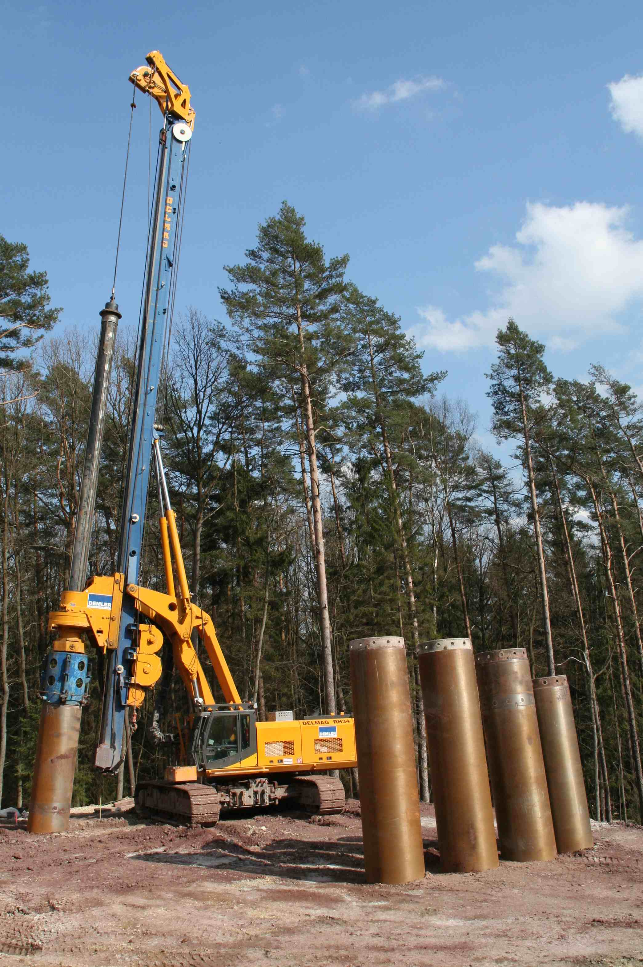 Talbrücke Nestelgraben, Bundesautobahn A73 bei Lichtenfels